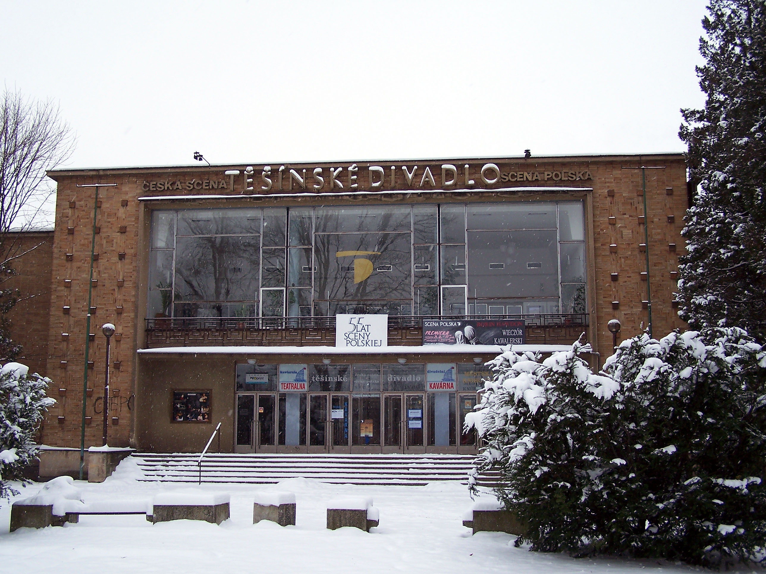 Těšín Theatre (Těšínské divadlo, Teatr Cieszyński) in Český Těšín (Czeski Cieszyn)